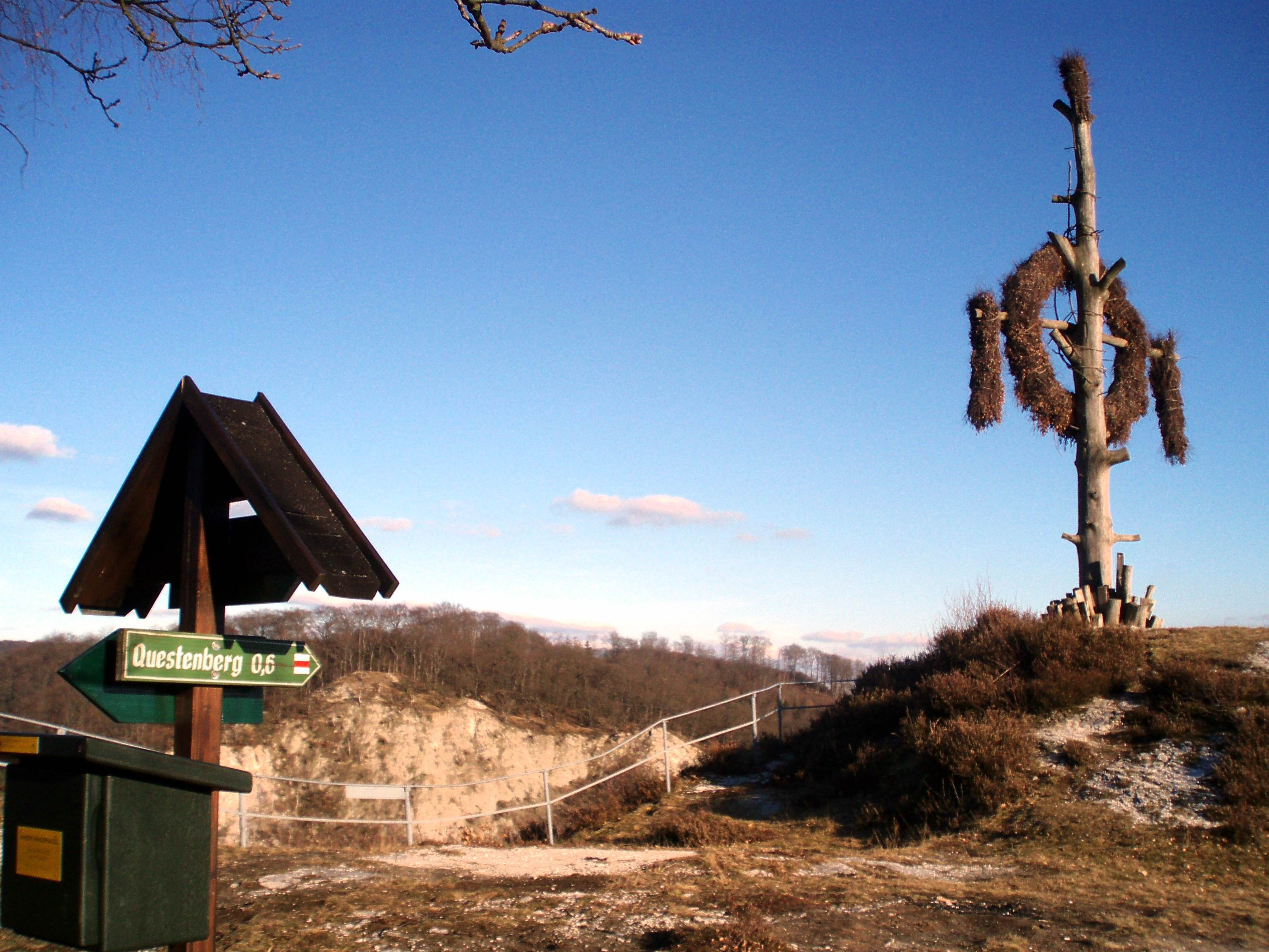 Auf der Queste in Questenberg